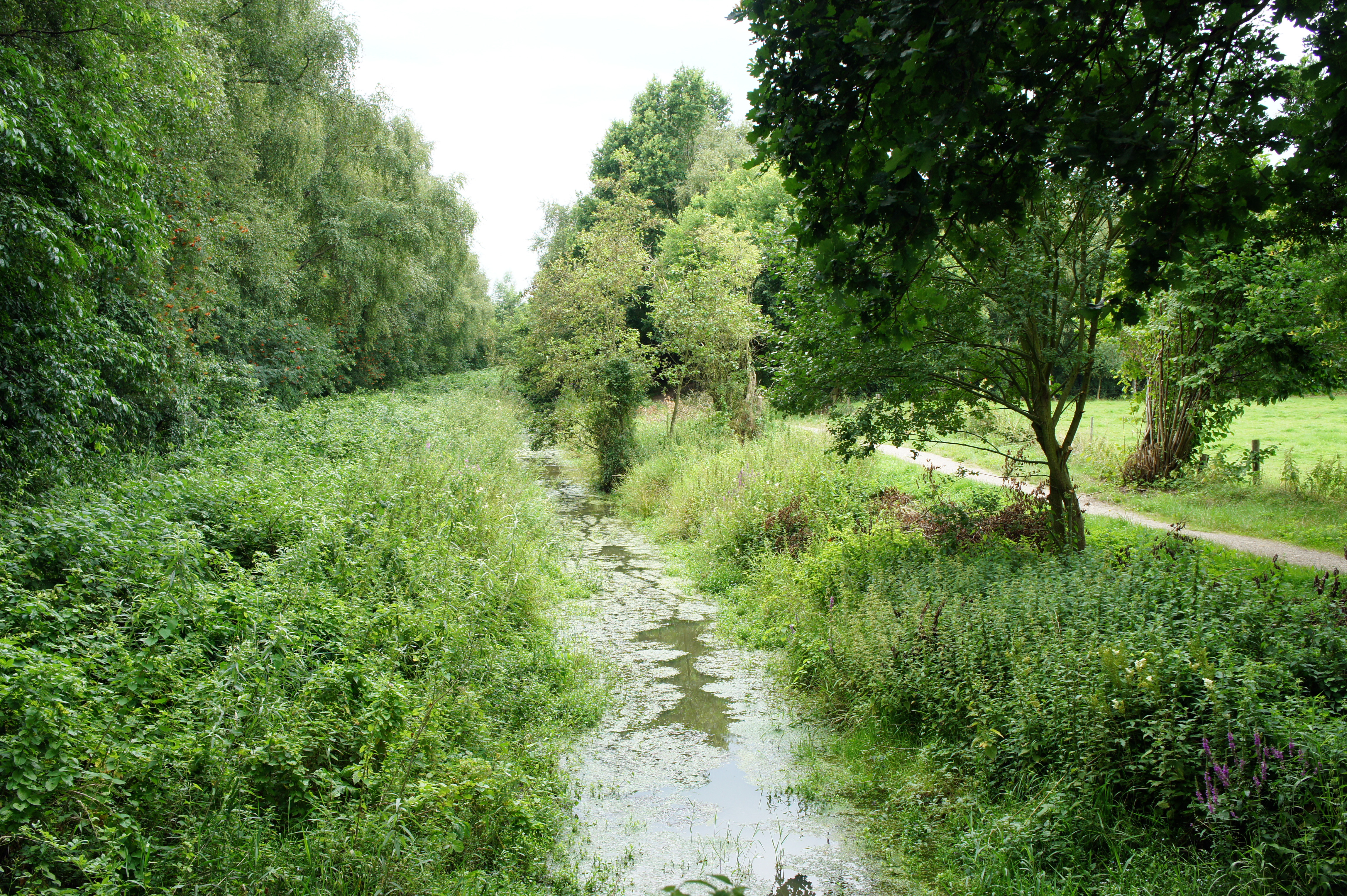 Der Geestrandgraben im NSG Nordenholzer Moor, Gemeinde Hude (Oldenburg)